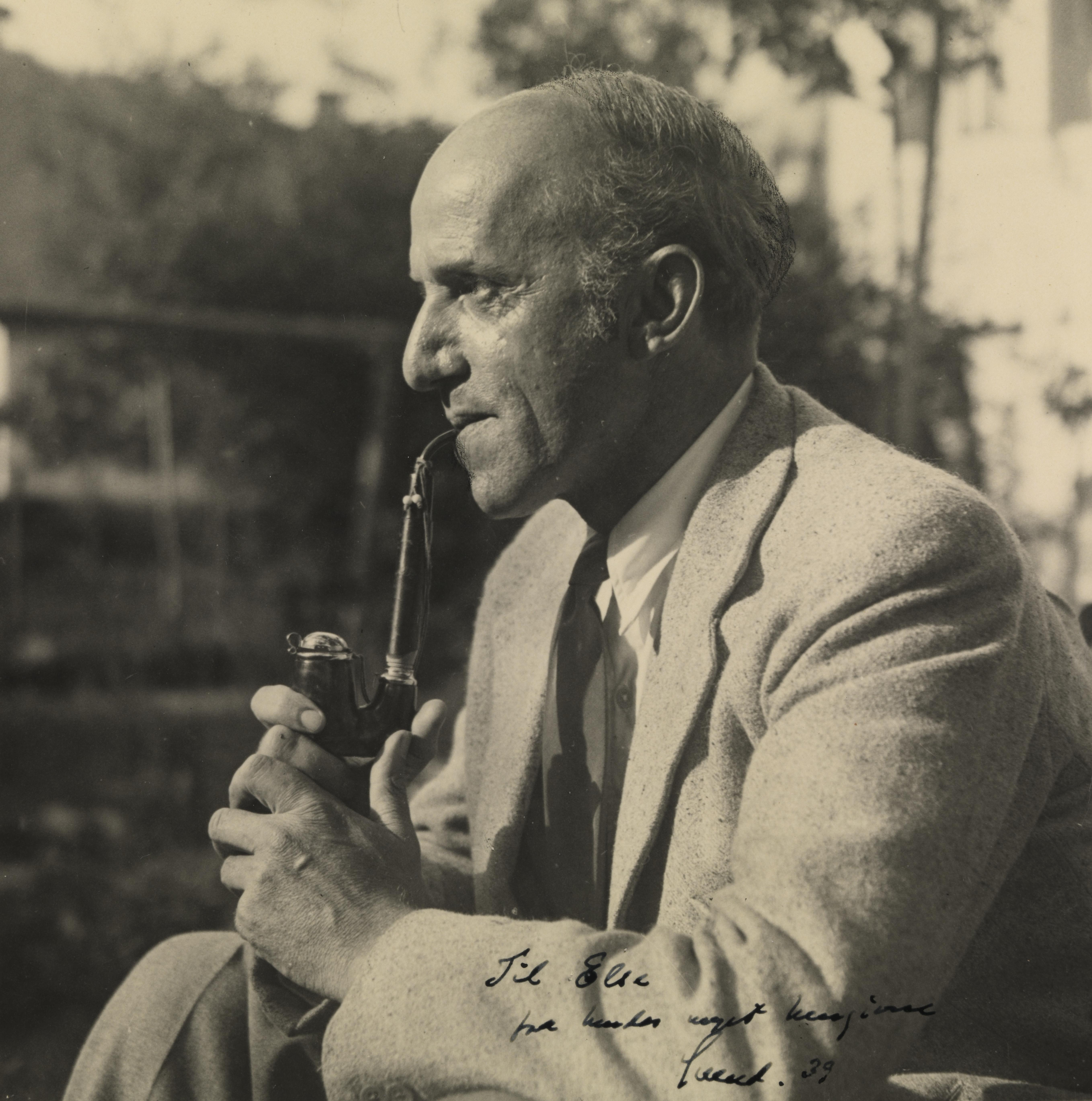 Bildet er hentet fra Nasjonalbibliotekets bildesamling Depicted person: Borberg, Svend